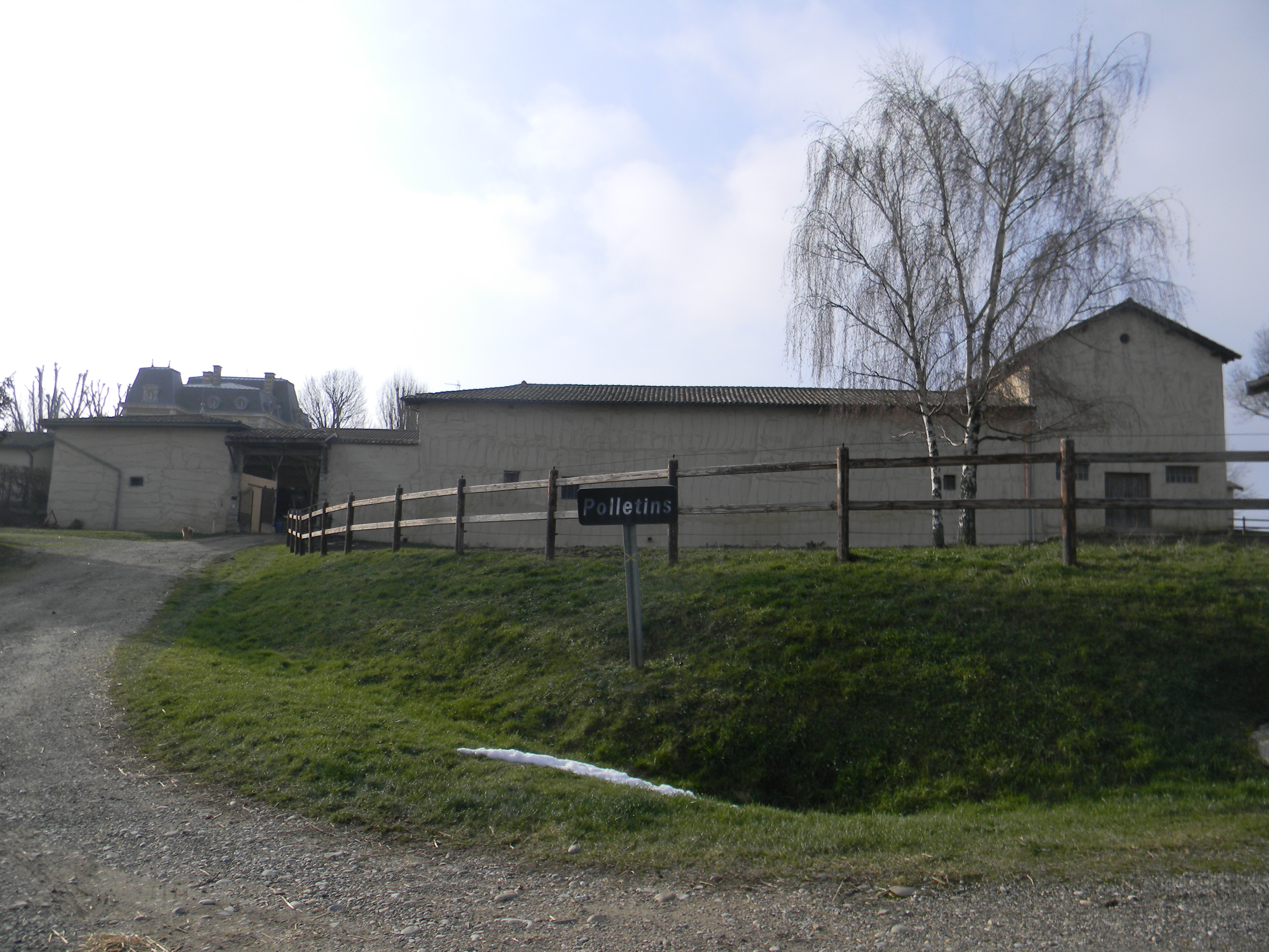 Haras de Polletins à Mionnay ; en arrière plan, le château de Polletins.